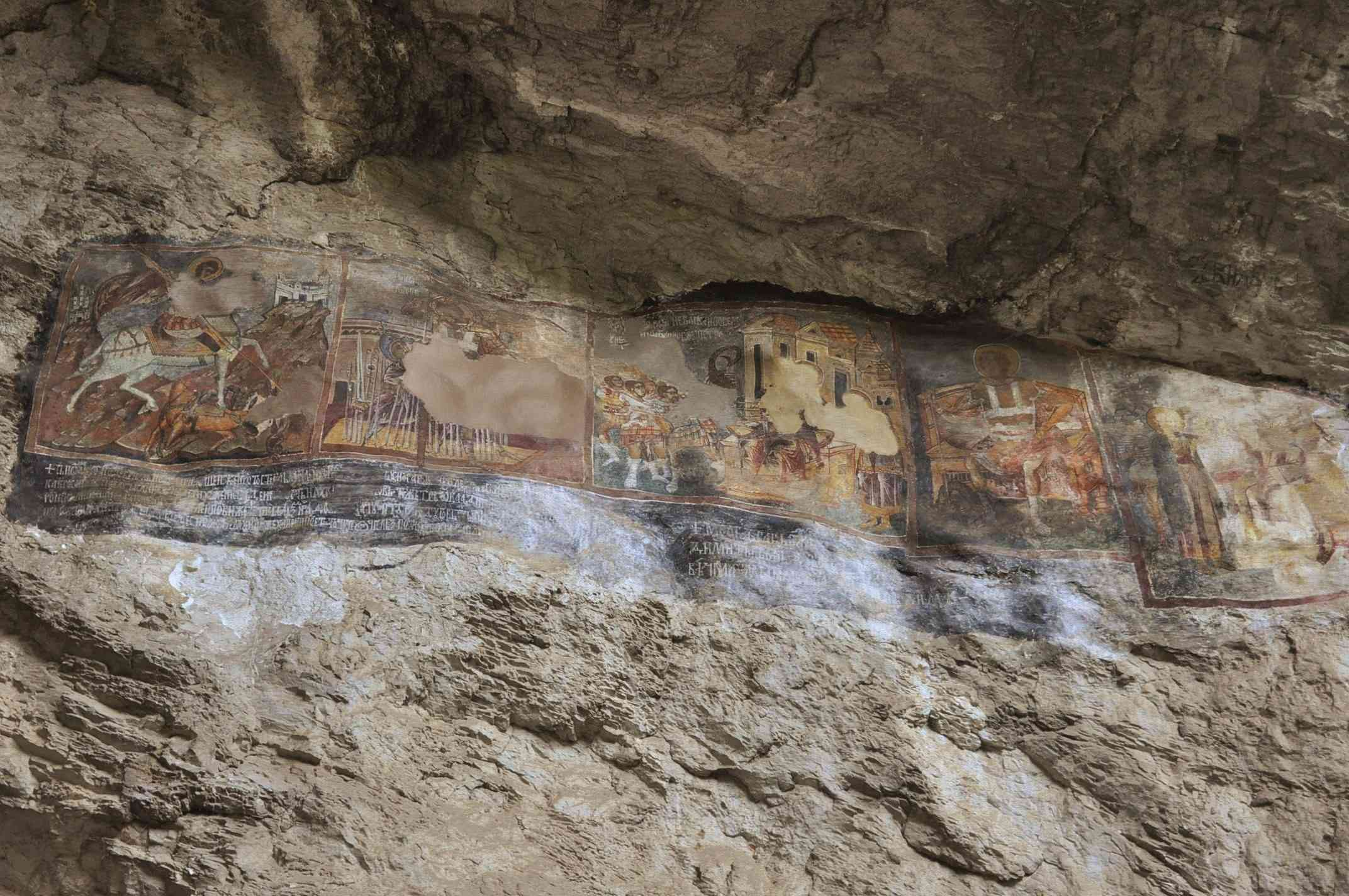 Стенопис в Голямата пещера